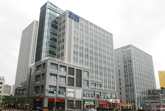 上海ハイロン本社ビル